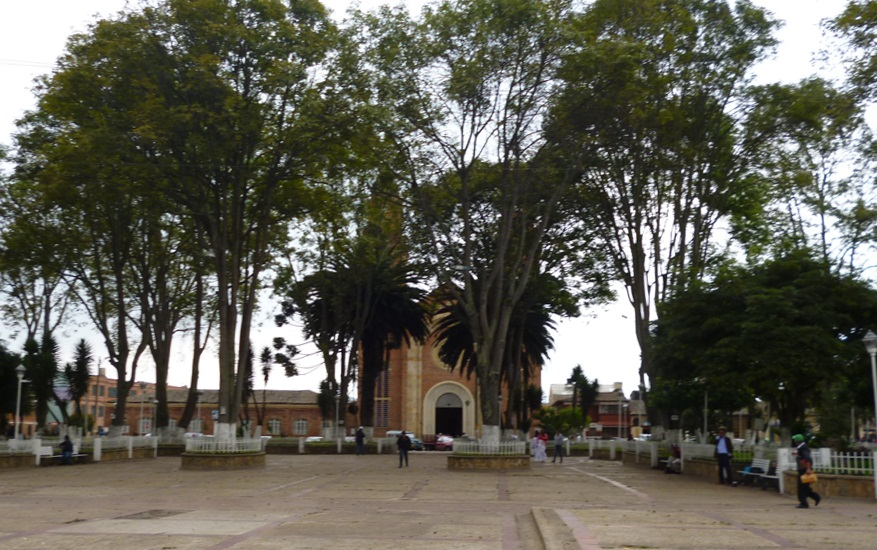 parque de mosquera 2012